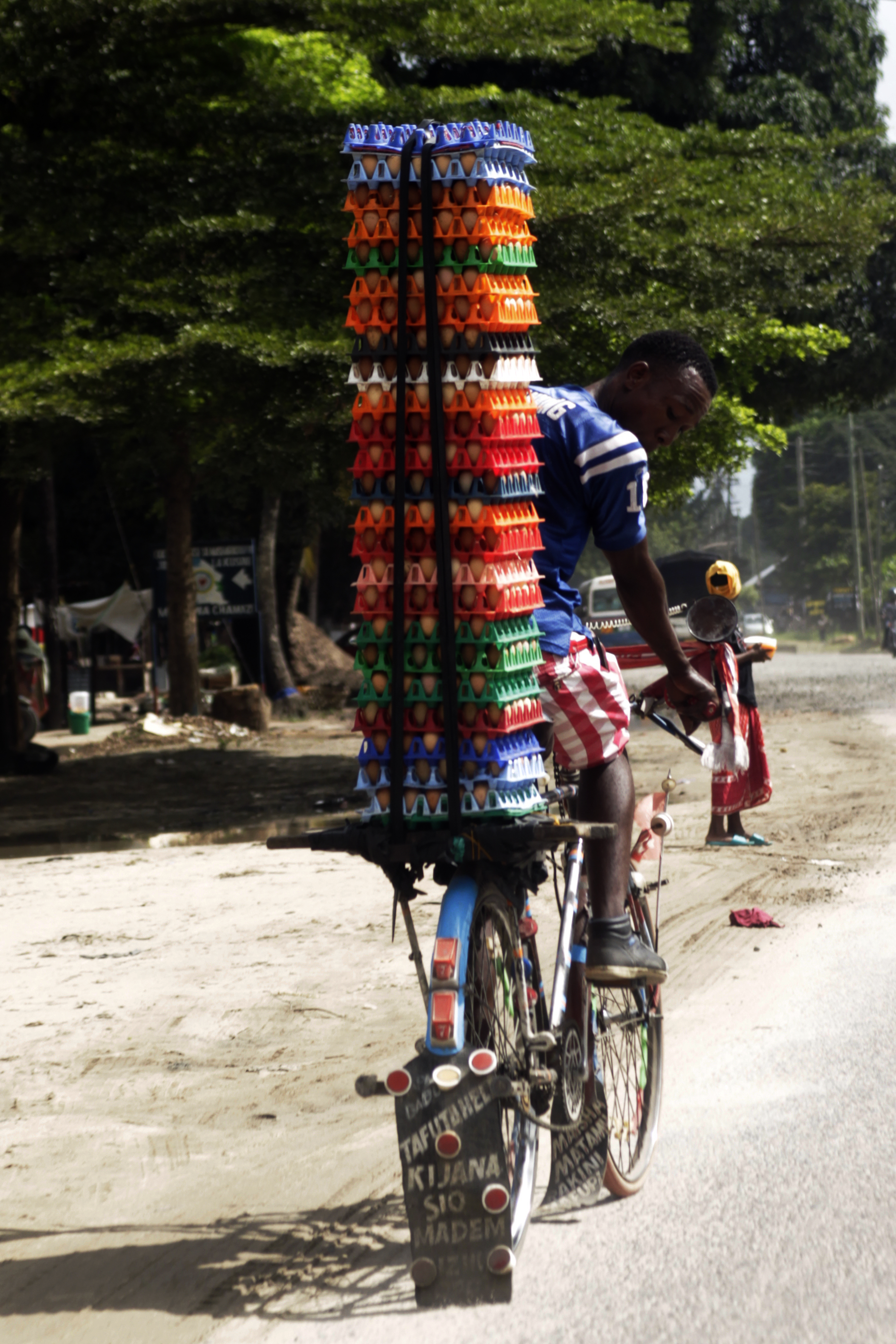 Un livreur d’œufs sur son vélo avec les alvéoles dans les rues de Dar El Salam en Tanzanie This is an image with the theme "Africa on the Move or Transport" from: Tanzania